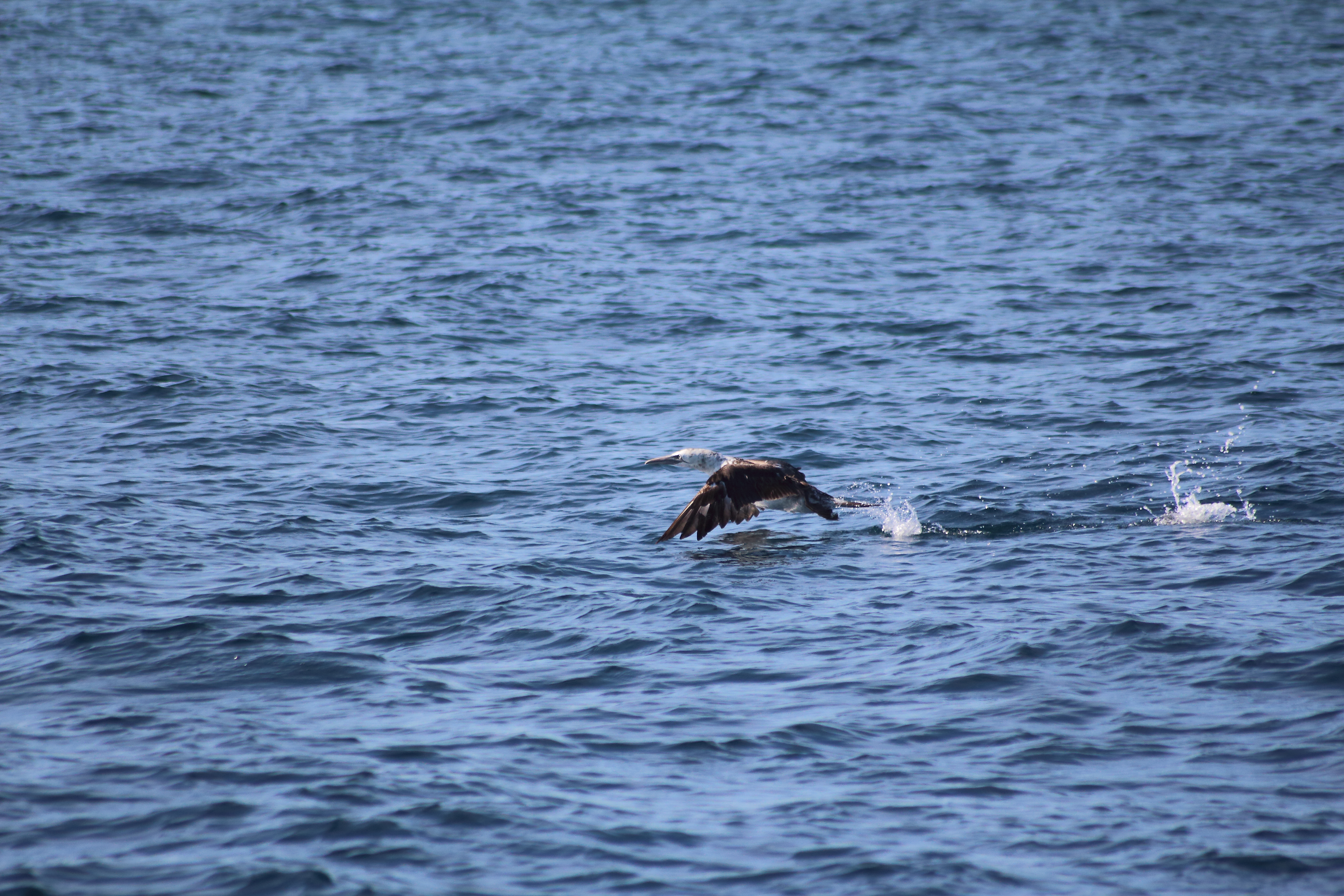 Un jeune Fou de Bassan au décollage au large des îles Glénan (Finistère, Bretagne, France).